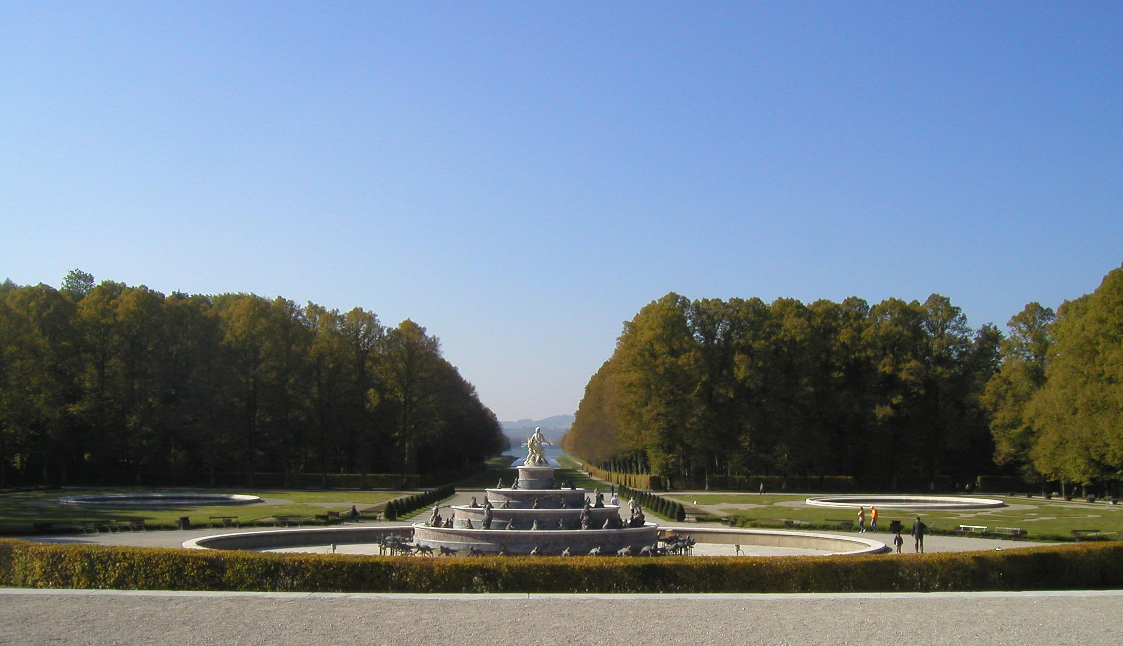 Schlosspark Herrenchiemsee